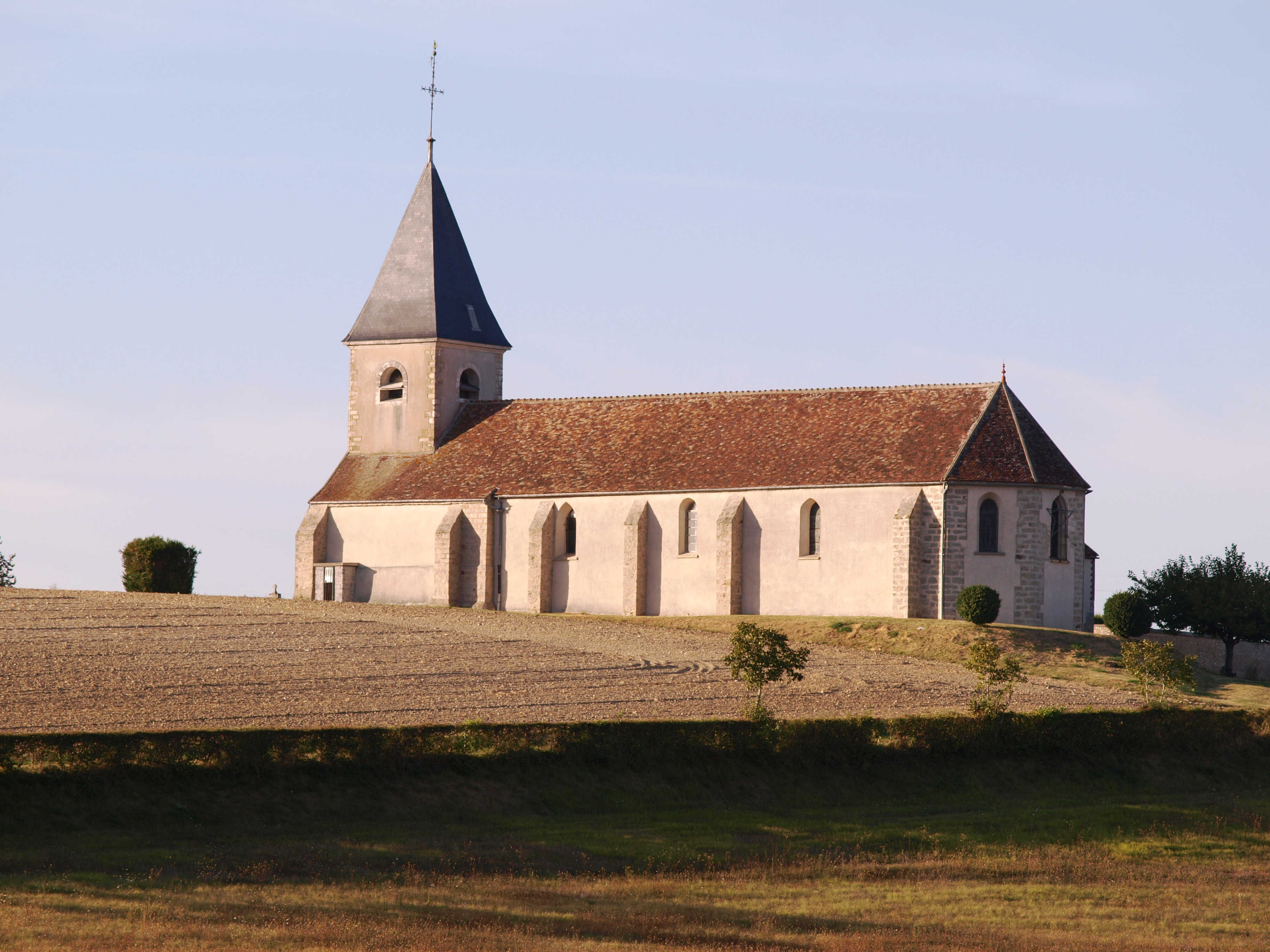 Béon (Yonne, France) ; église .